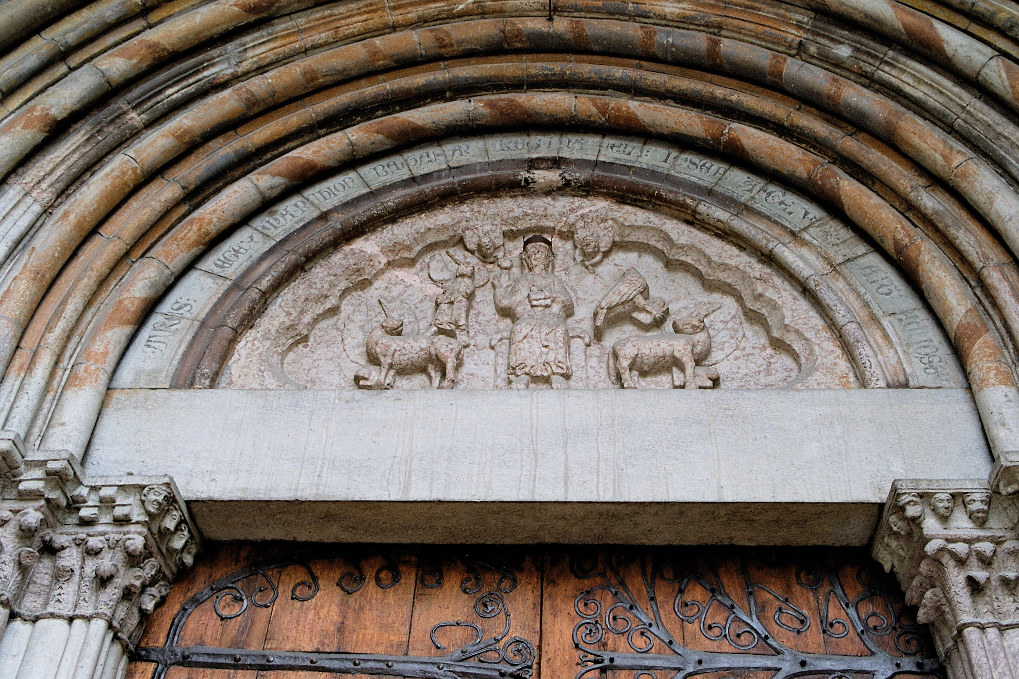 Embrun-porche des lions, tympan